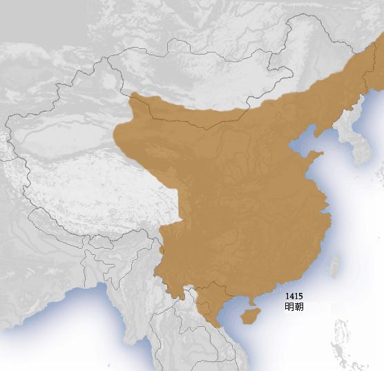 明朝1415年疆域。